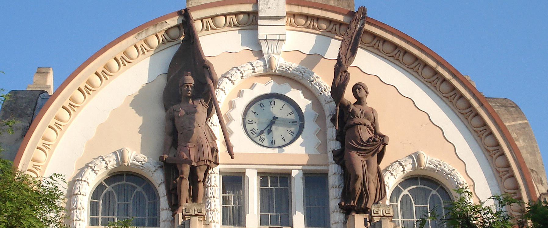 Detalhe do frontispício do Colégio Militar de Porto Alegre, Brasil.